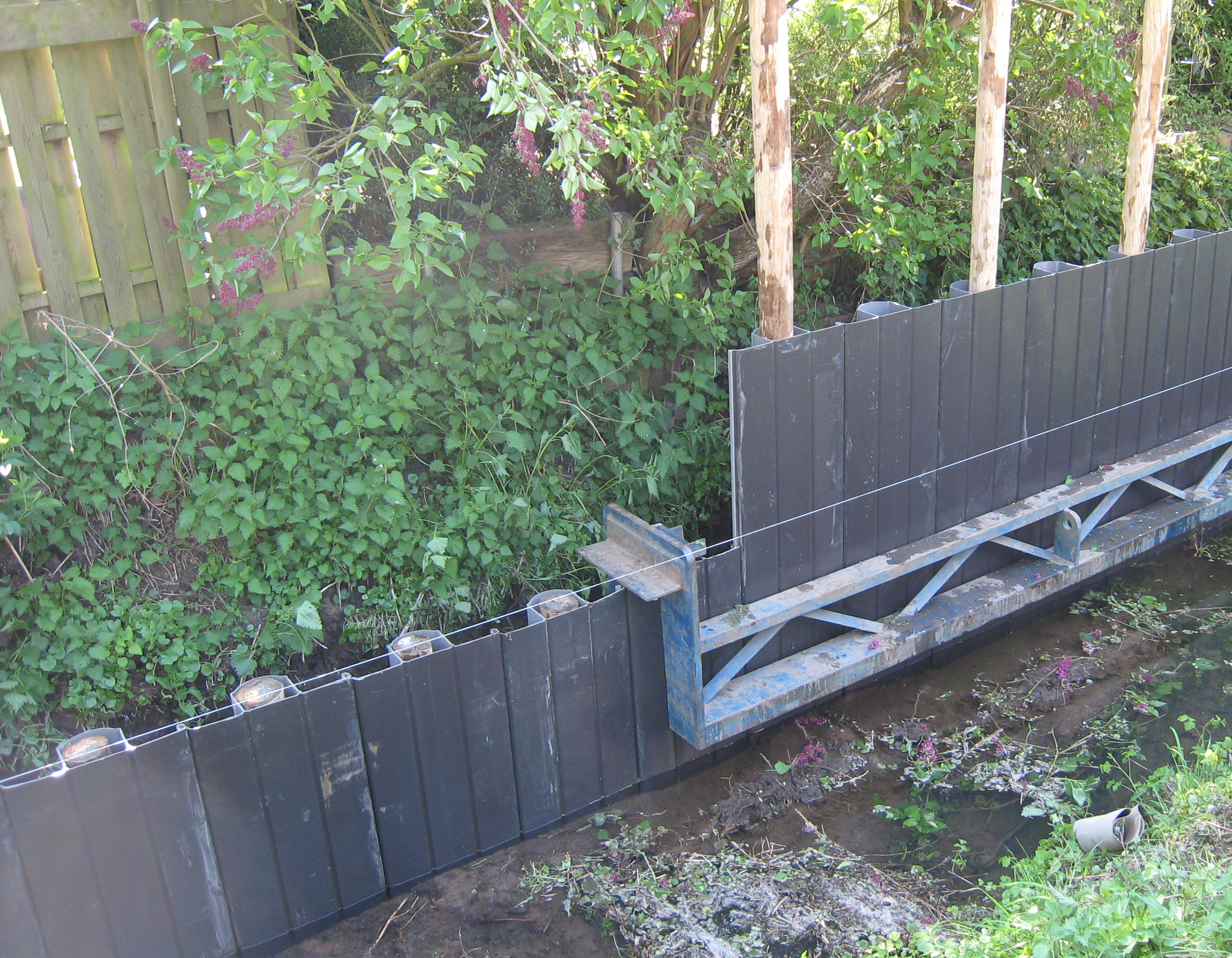 Prolock oeverbescherming aangebracht met een heiraam